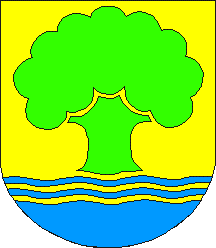 Pühajärve valla vapp